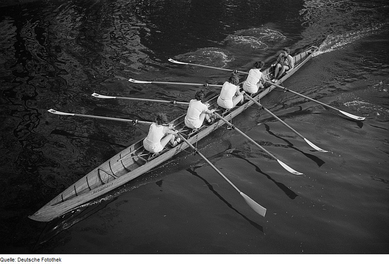 Original image description from the Deutsche Fotothek Ruderinnen